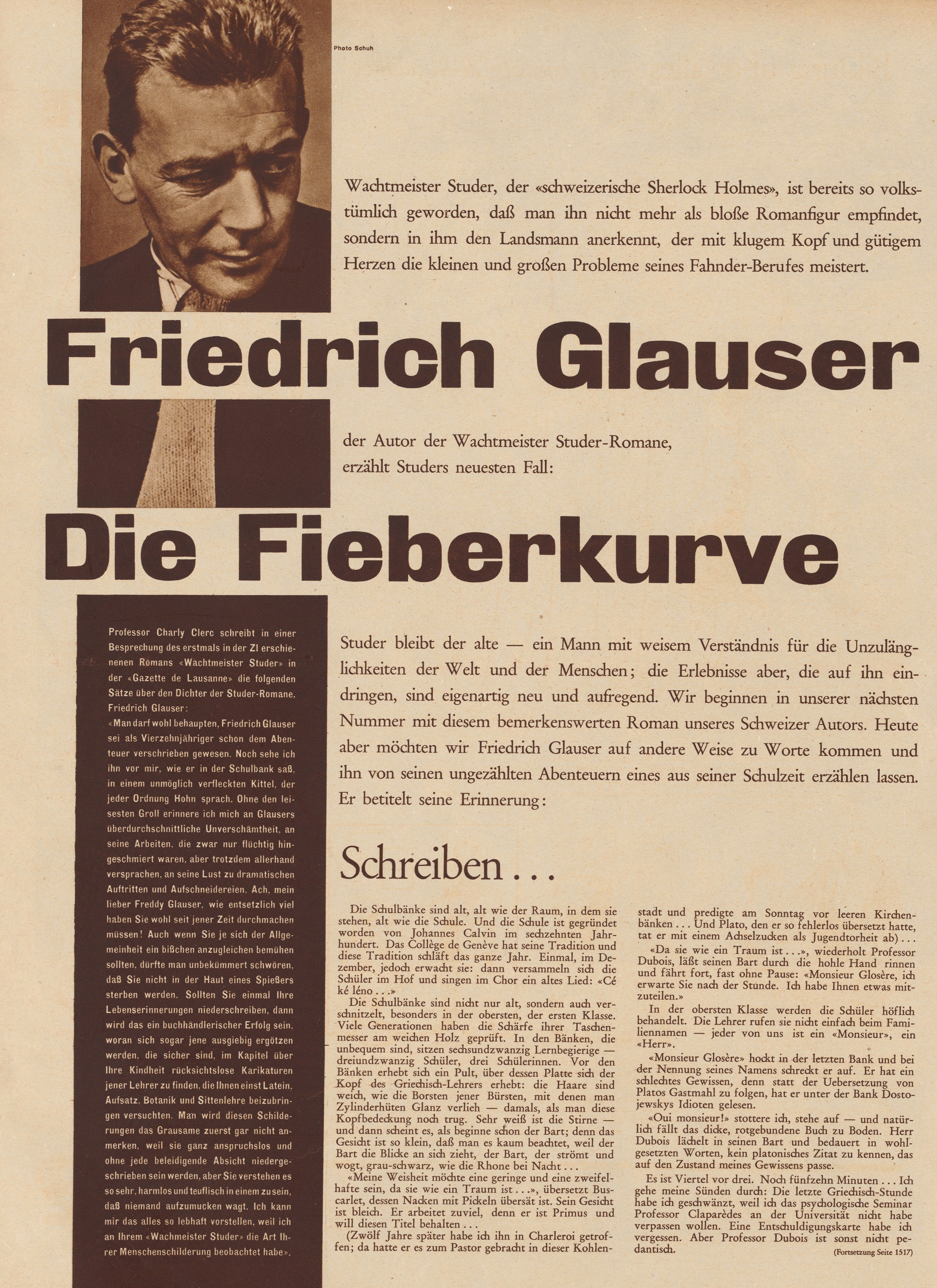 Erstruck "Die Fieberkurve". Ausschnitt aus der "Zürcher Illustrierten" Nr. 49, vom 3. Dezember 1937